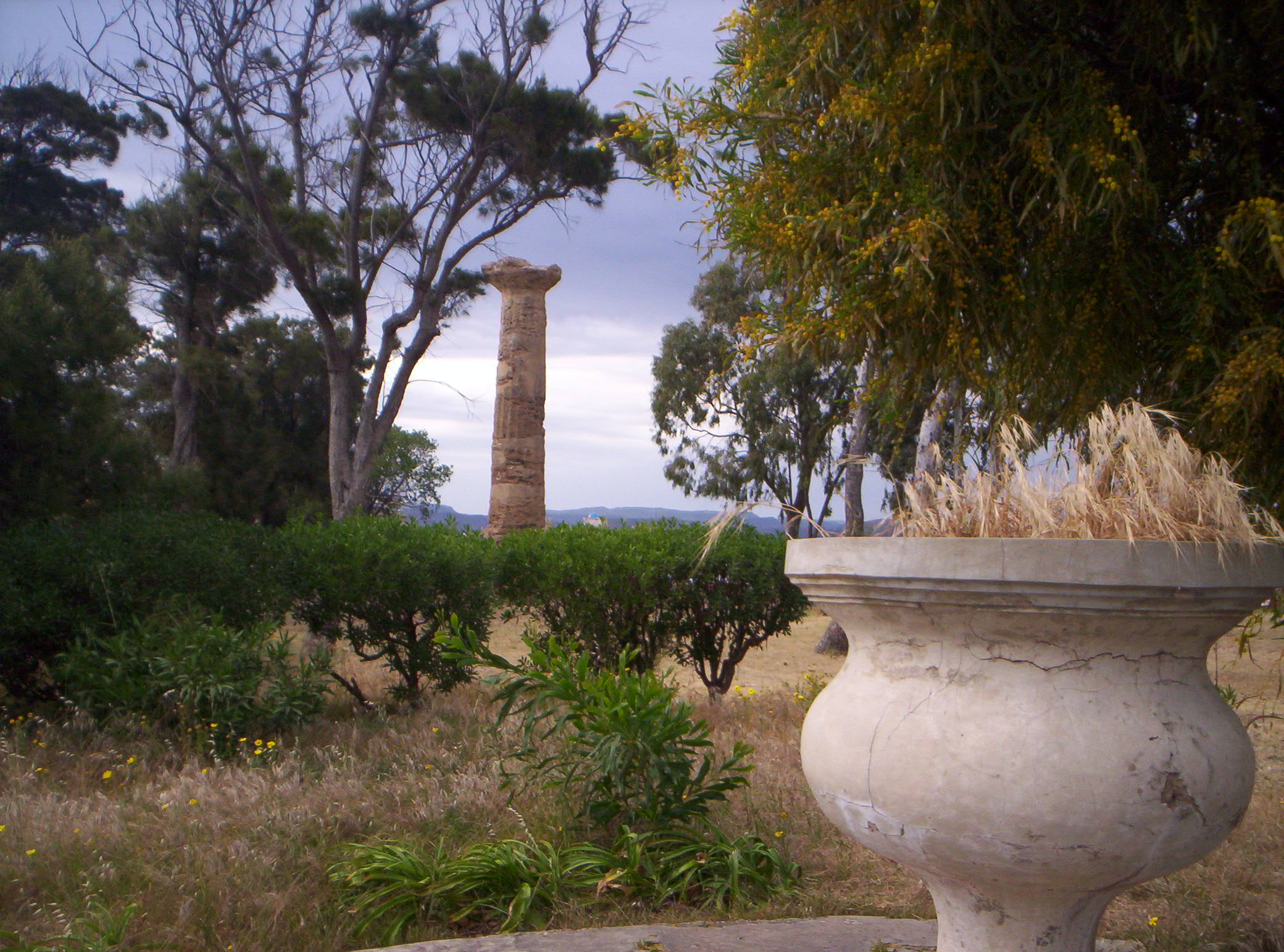 scorcio della colonna dorica più vaso